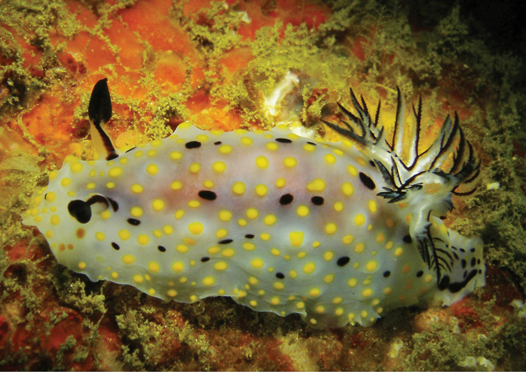 Halgerda punctata, 17-20 mm, Sri Lanka